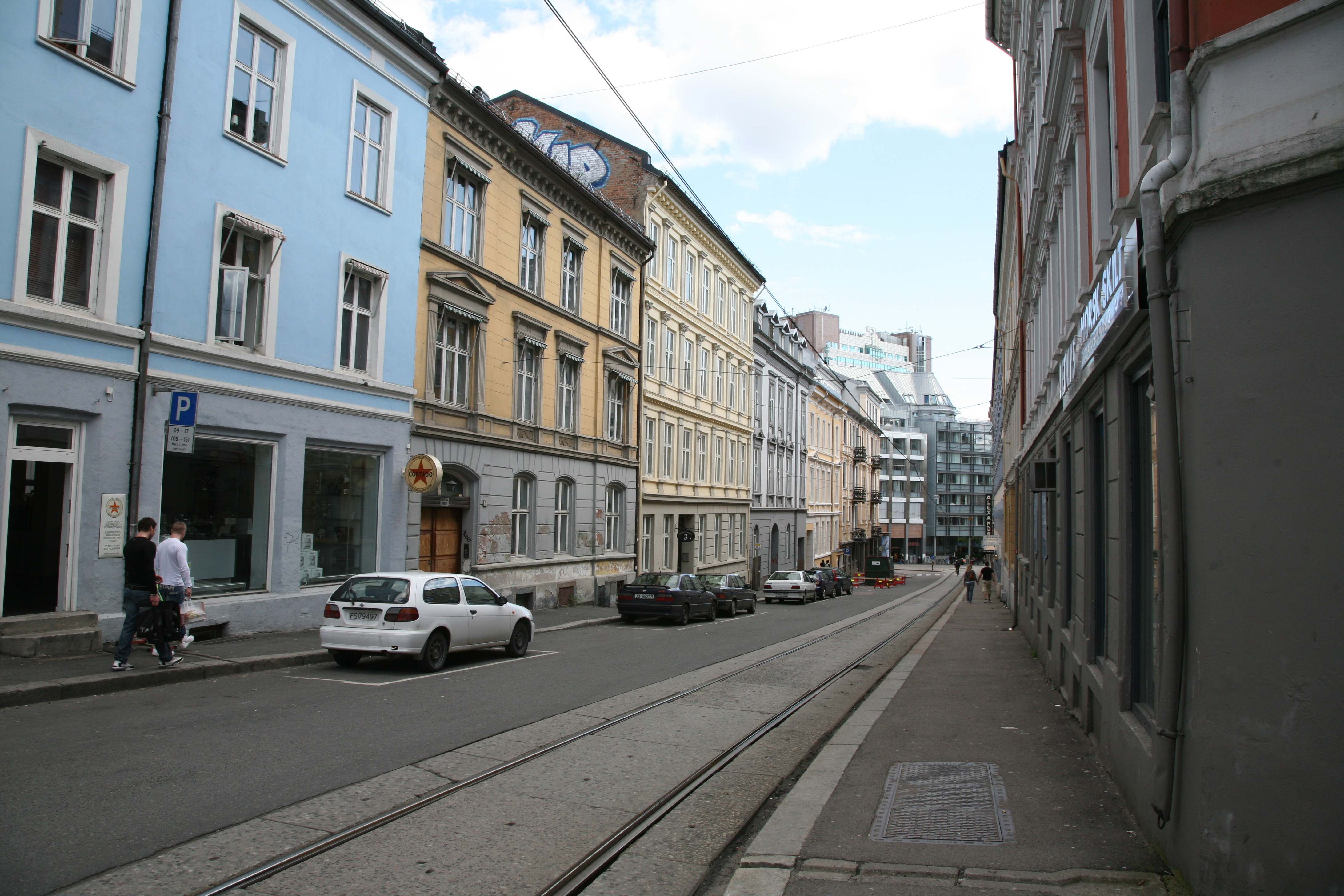 Welhavens gate in Oslo